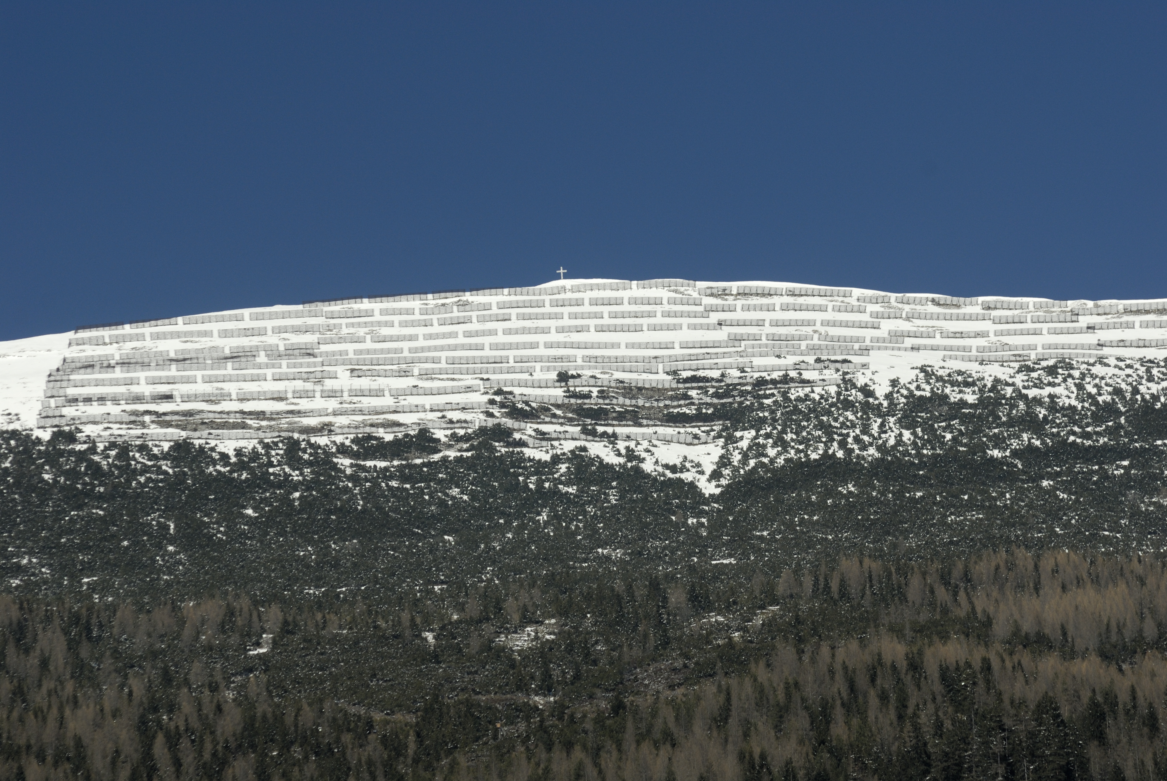 Gipfelbereich des Stanser Jochs mit Lawinenverbauung im Anbruchsgebiet